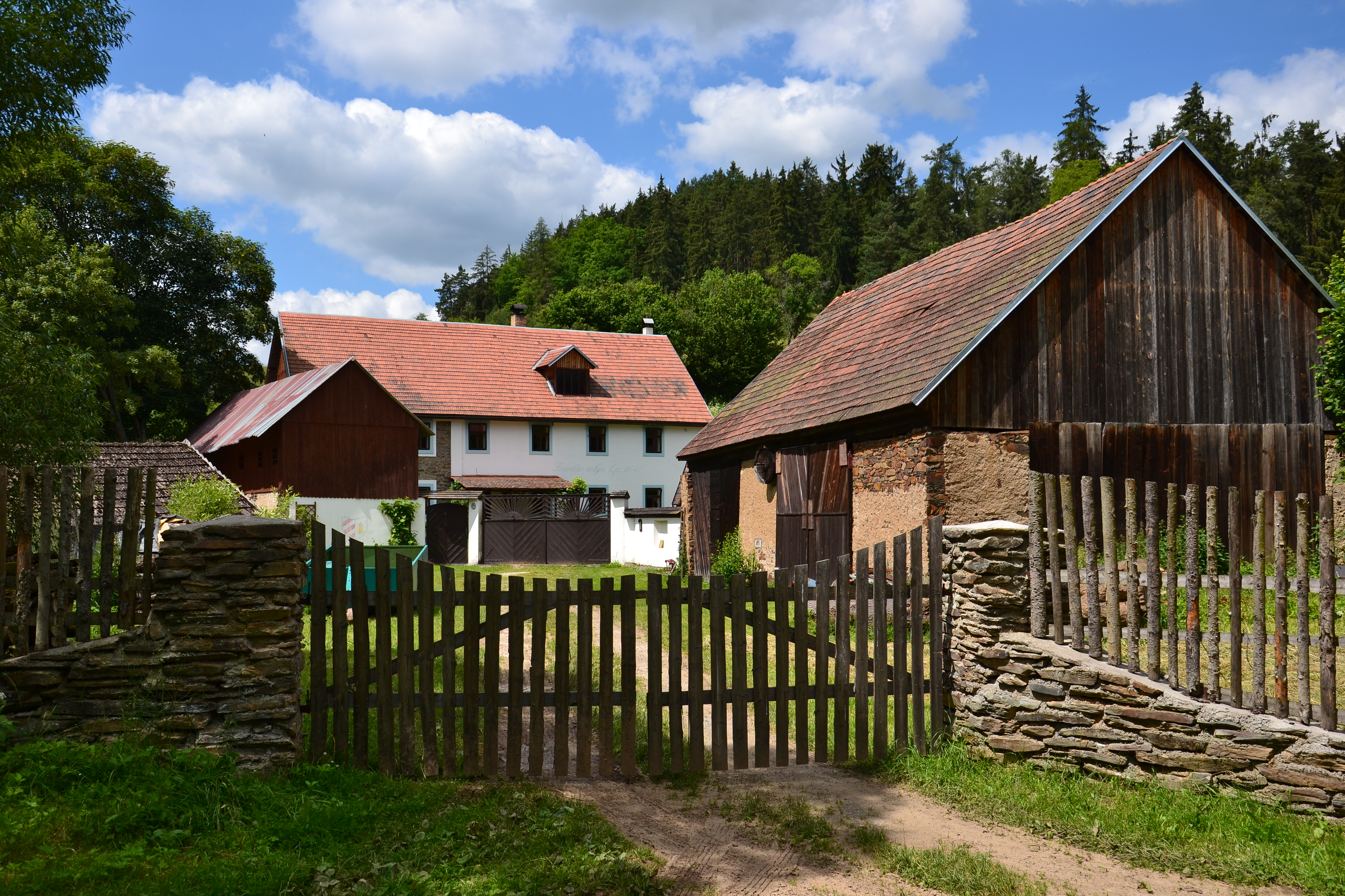 Vodní mlýn Frantův (Brdo), Brdo 14